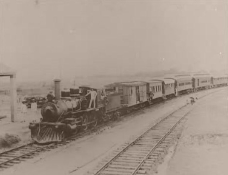 新宁铁路